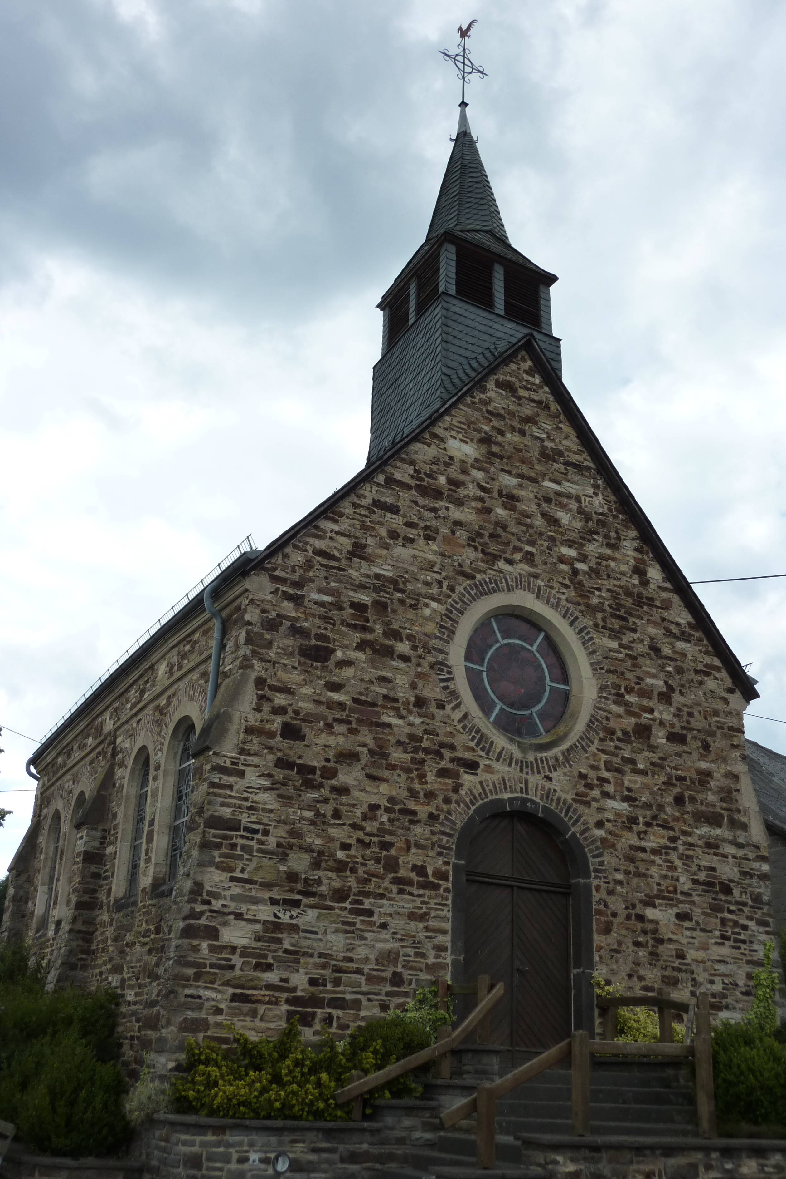 katholische Kirche St. Rochus in Rodder, Portalseite